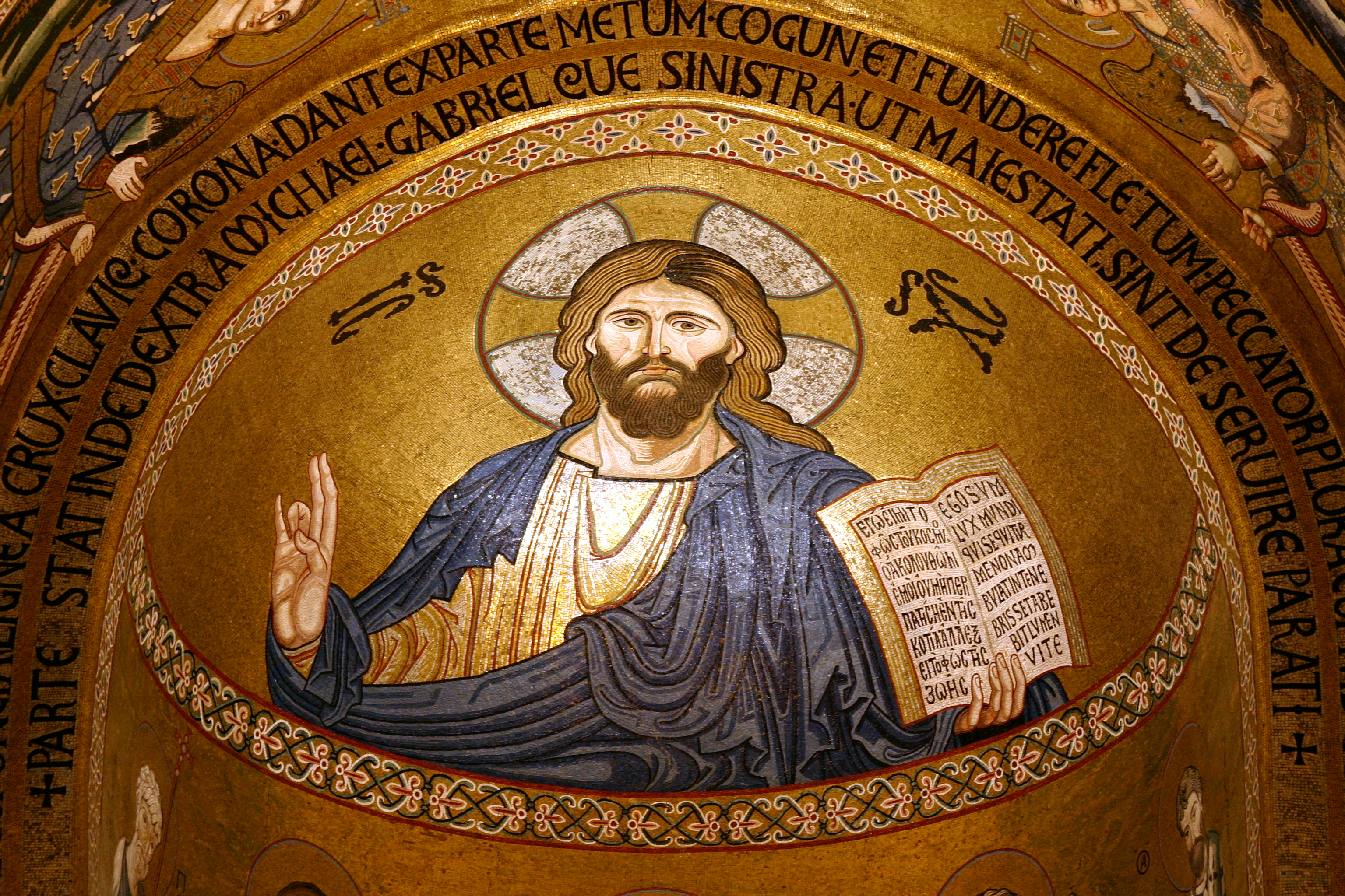 Capela Palatina